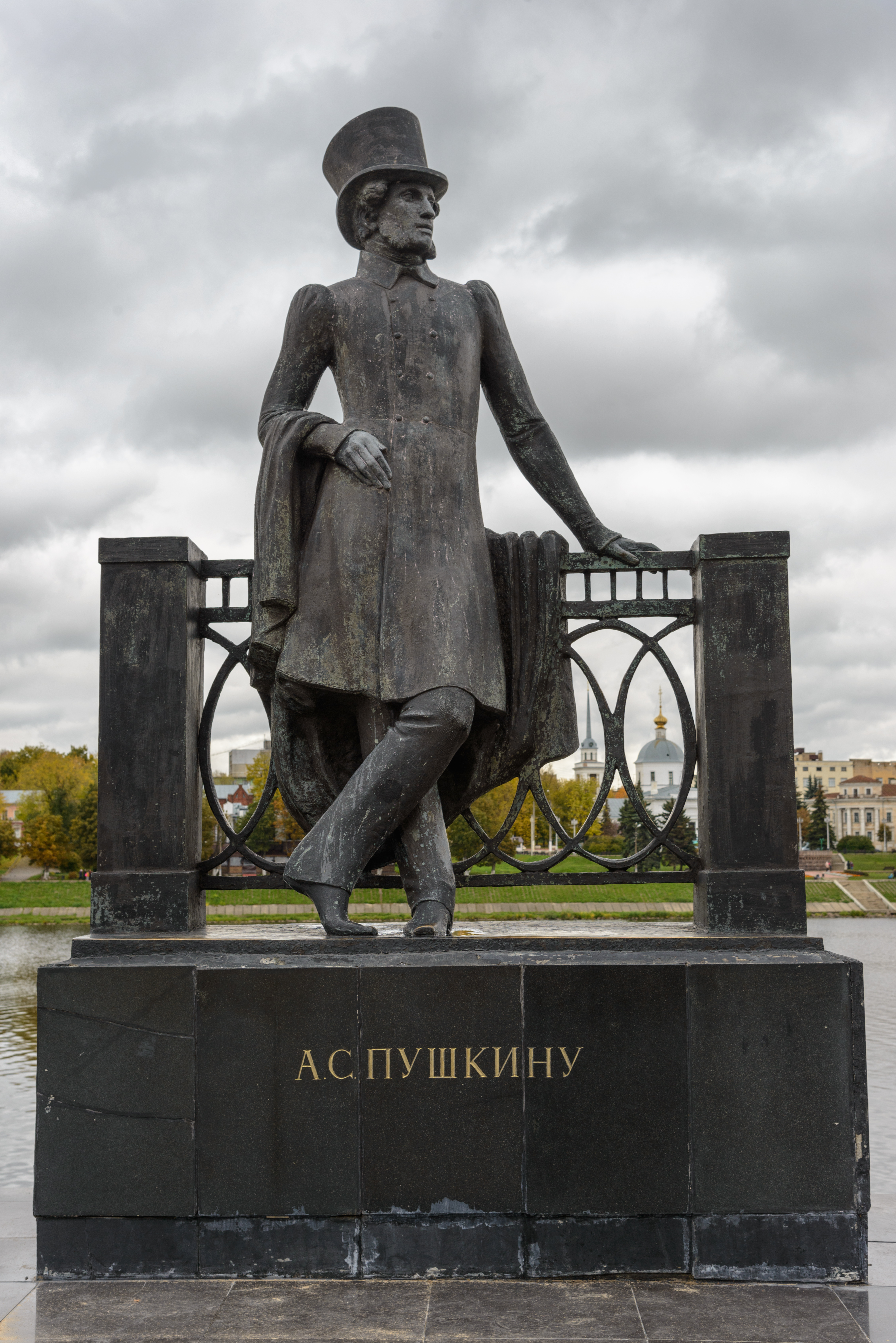 Памятник Пушкину на набережной Волги в Твери